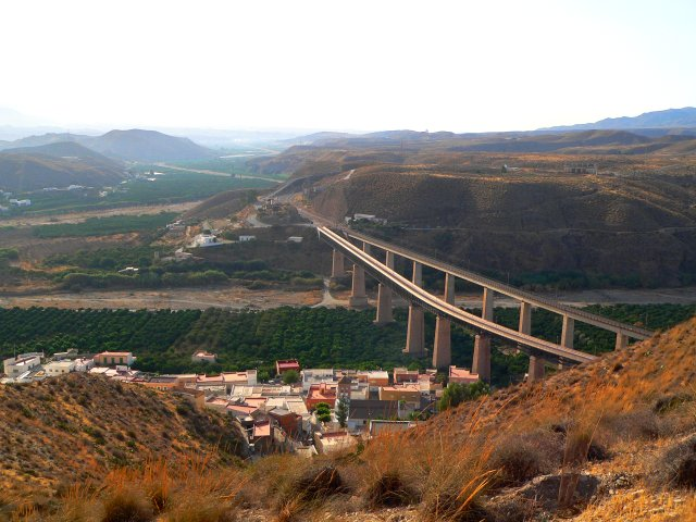 Vista general de Santa Fe de Mondújar, Almería, España.